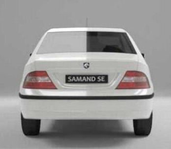 ماشین سمند